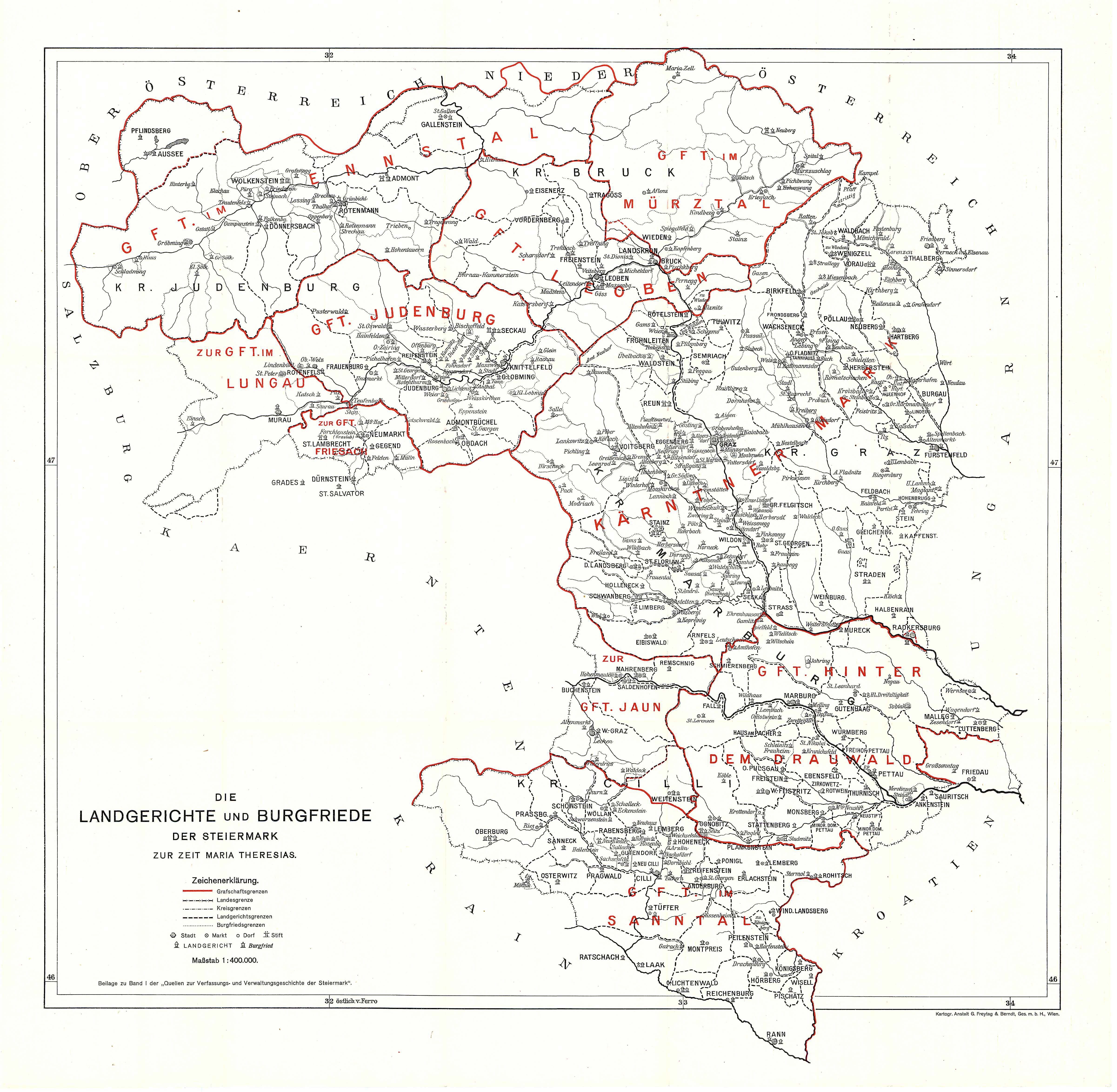 schematische Übersichtskarte der Grenzen der Gerichtssprengel, Grafschaften und Kreise der Steiermark im 18. Jahrhundert in der Zeit Maria Theresias